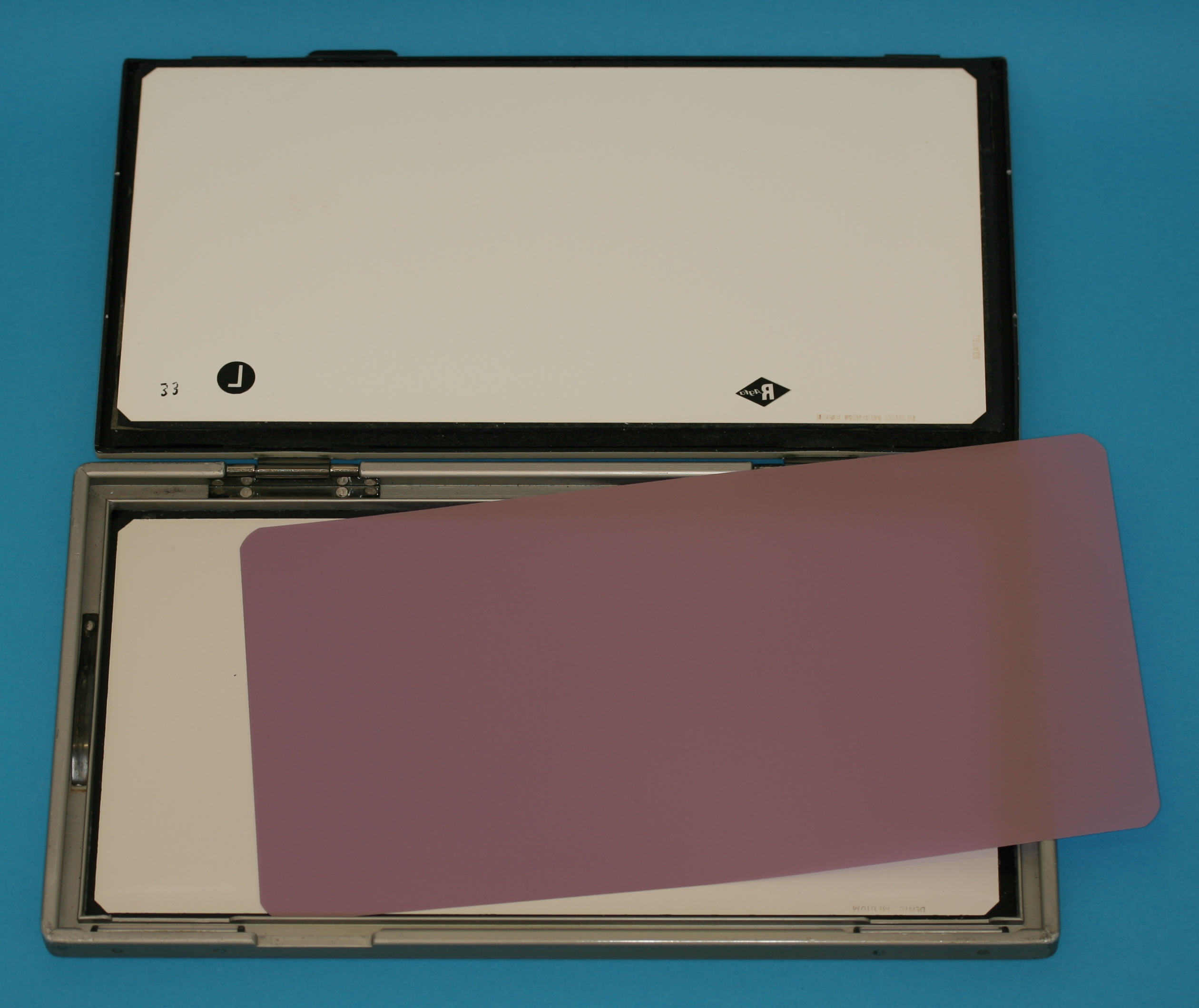 geöffnete Röntgenfilmkassette mit den beiden weißen Verstärkerfolien und einem Röntgenfilm